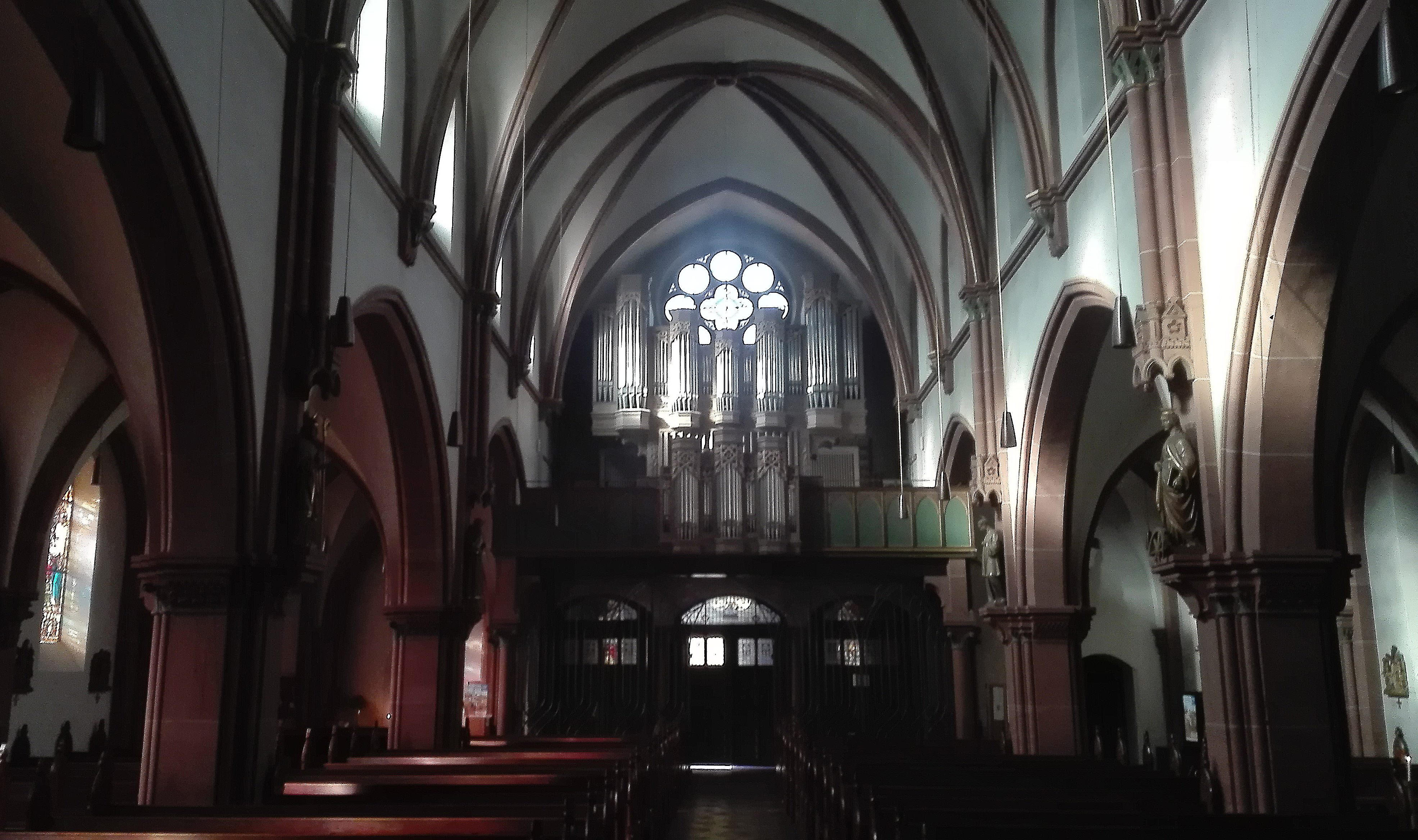 Blick zur Orgelempore der Pfarrkirche St. Pankratius (Offenbach-Bürgel)